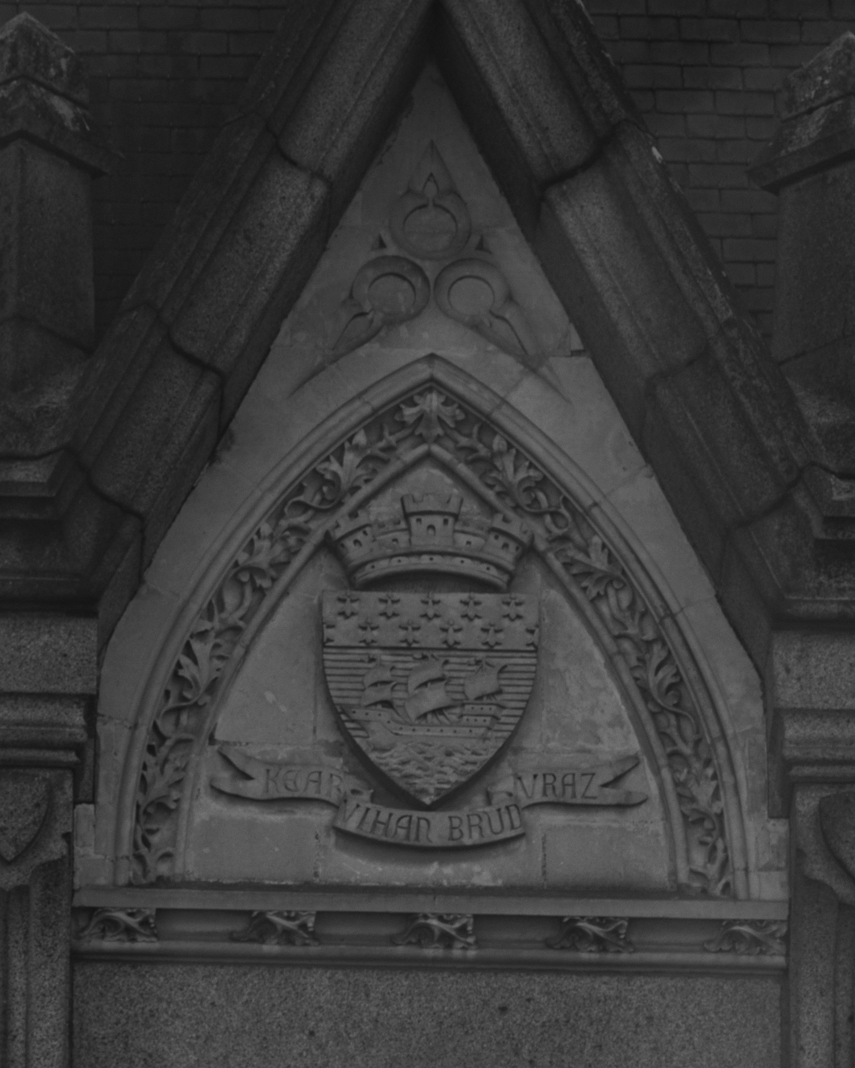 Blason et devise de la ville sur la tour de l'hôtel de ville (D’azur au vaisseau équipé et habillé d’argent, voguant sur des ondes du même mouvant de la pointe, au chef aussi d’argent, chargé de cinq mouchetures d’hermine de sable).